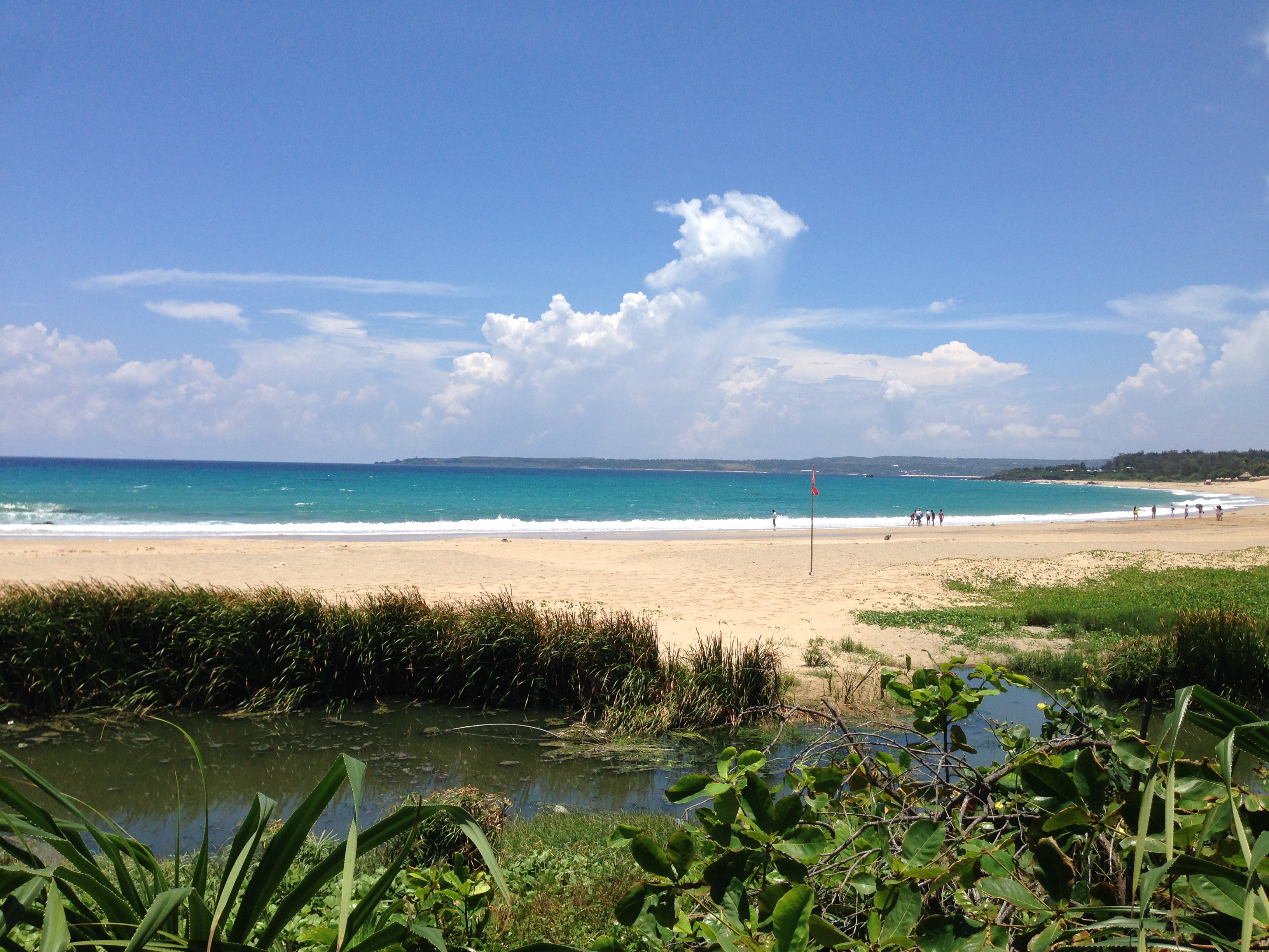 八寶公主廟前墾丁大灣